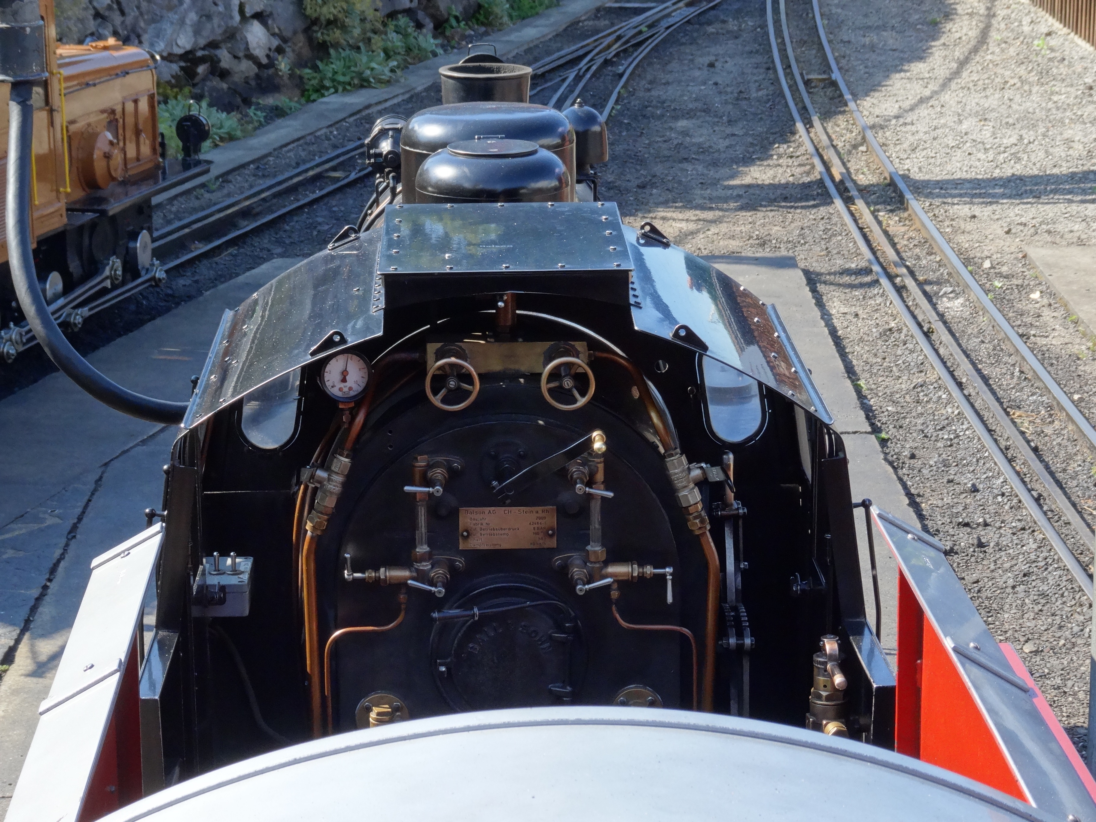 La cabine de la Harzquer du swiss vapeur Parc